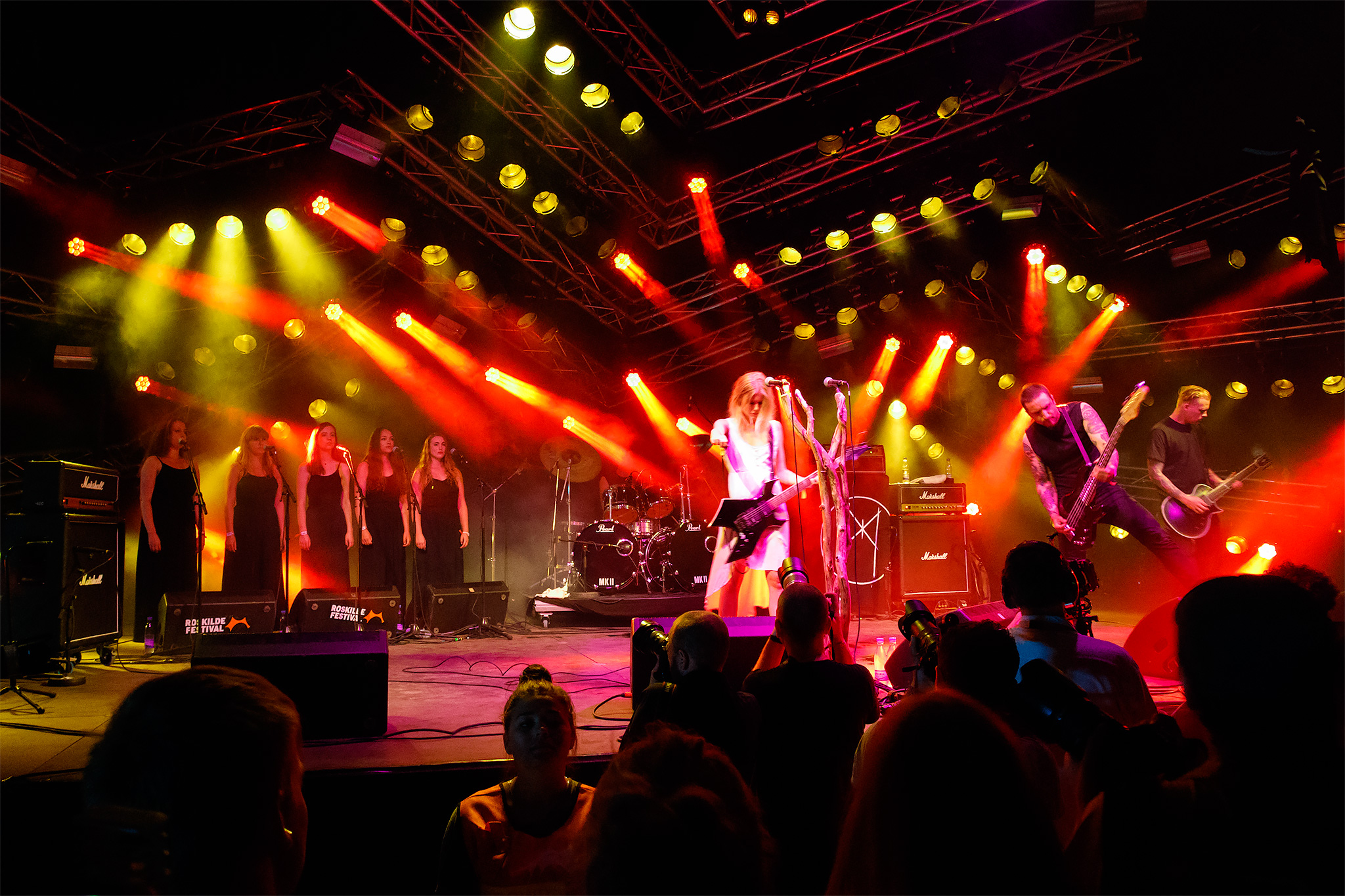 Myrkur at Roskilde Festival 2015